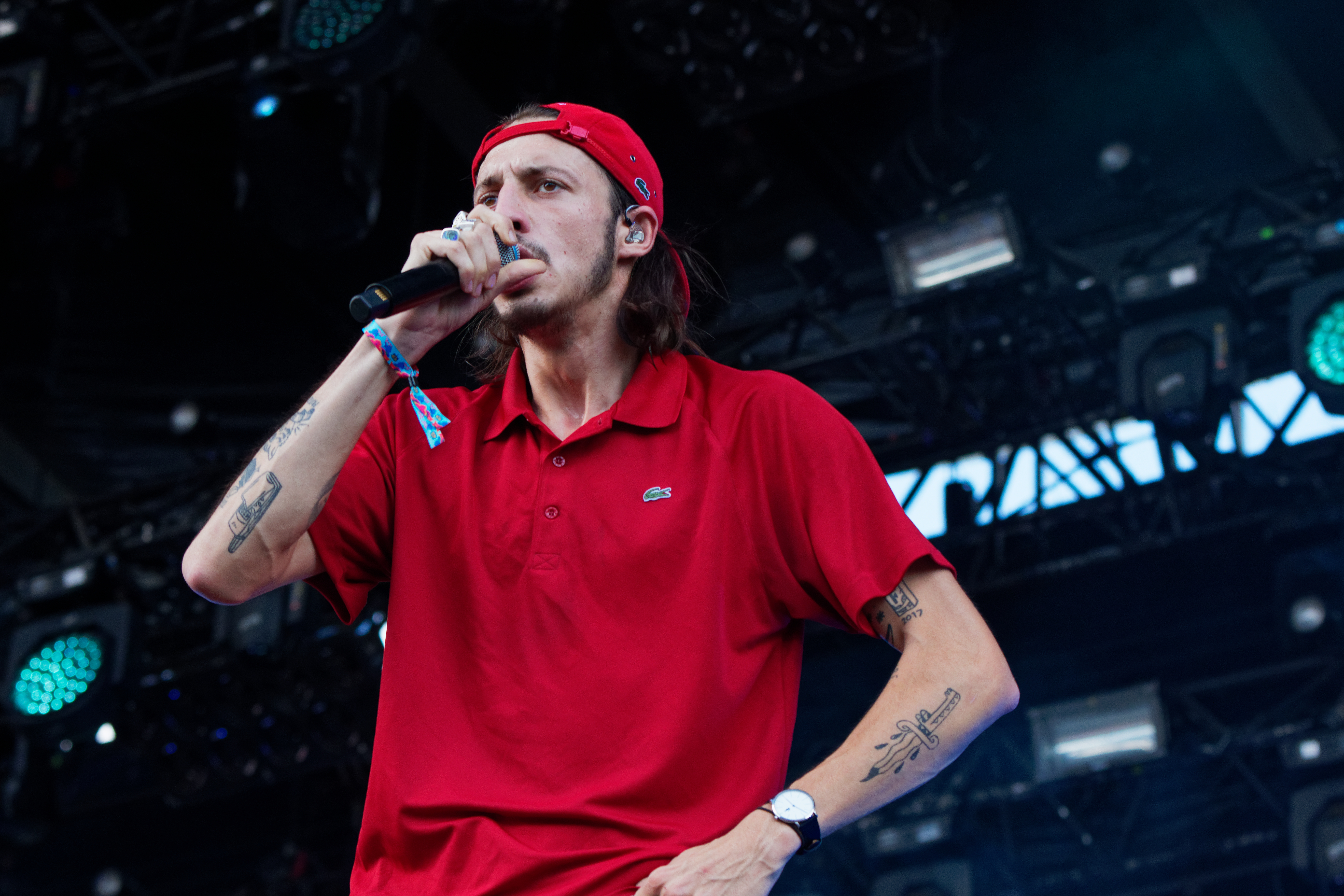 Roméo Elvis en concert lors du festival des vieilles charrues 2018.